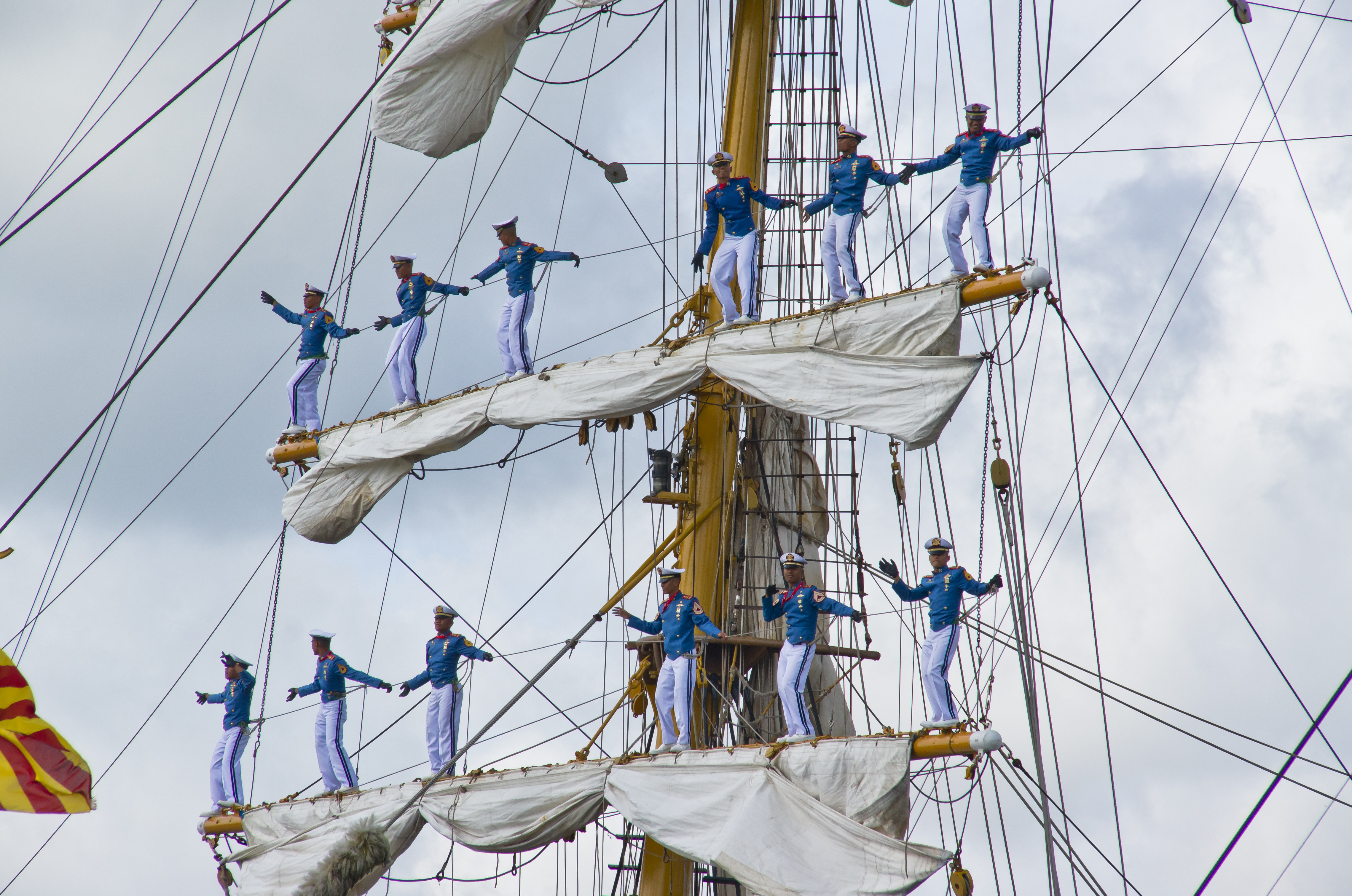 KRI Dewaruci - Sail 2010 - Amsterdam - the Netherlands